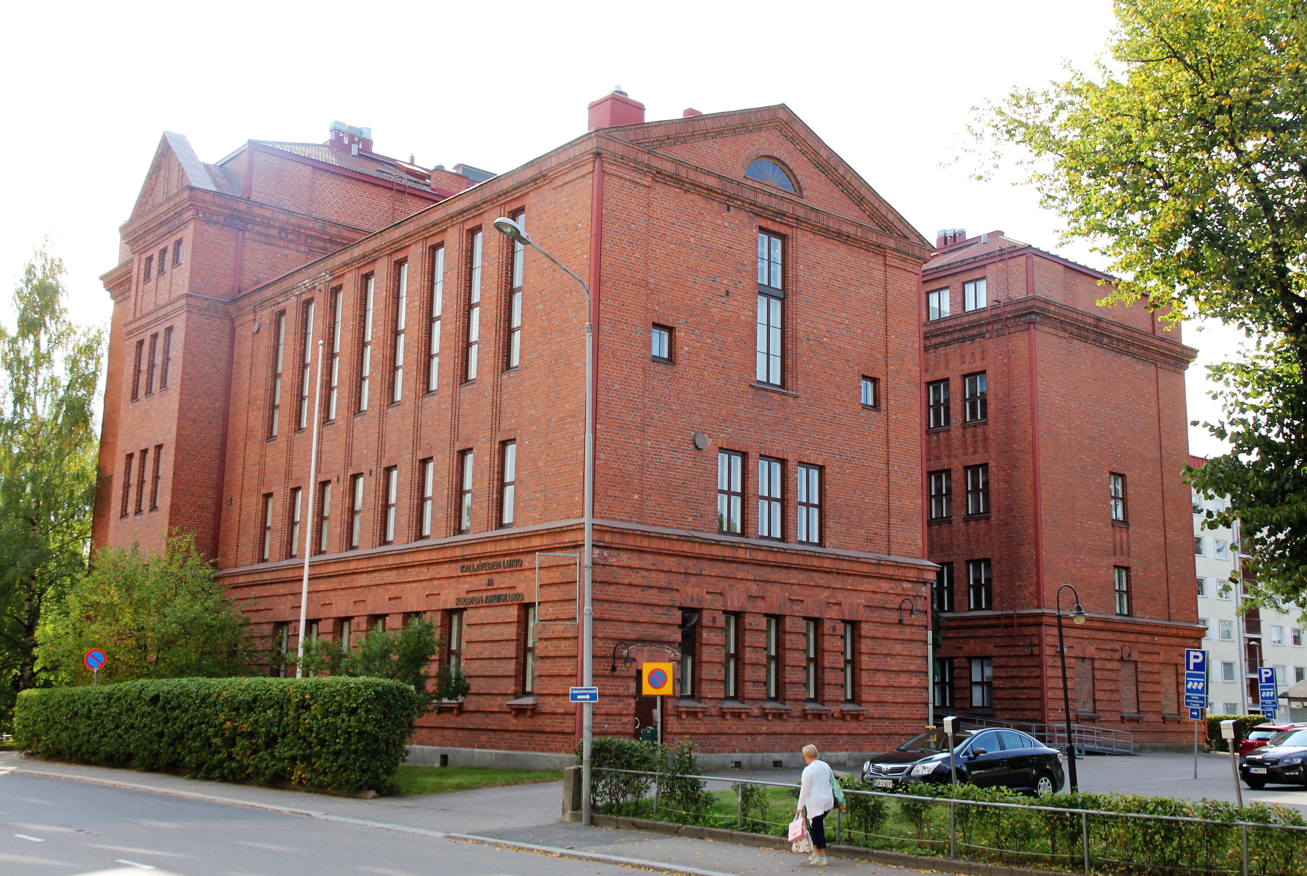 Kallaveden lukion punatiilirakennus Piispanpuiston pohjoislaidalla, osoitteessa Maaherrankatu 2, Kuopion Väinälänniemen kaupunginosassa.